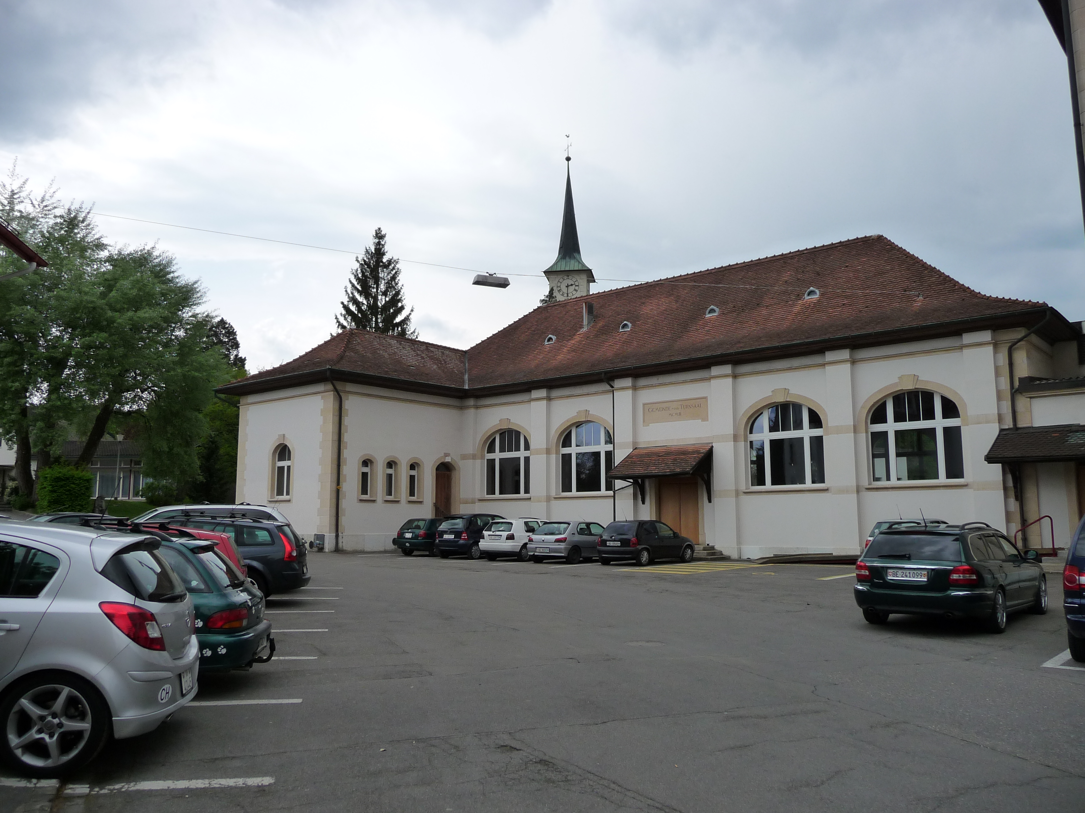 Gemeindesaal und reformierte Kirche im Hintergrund in Menziken